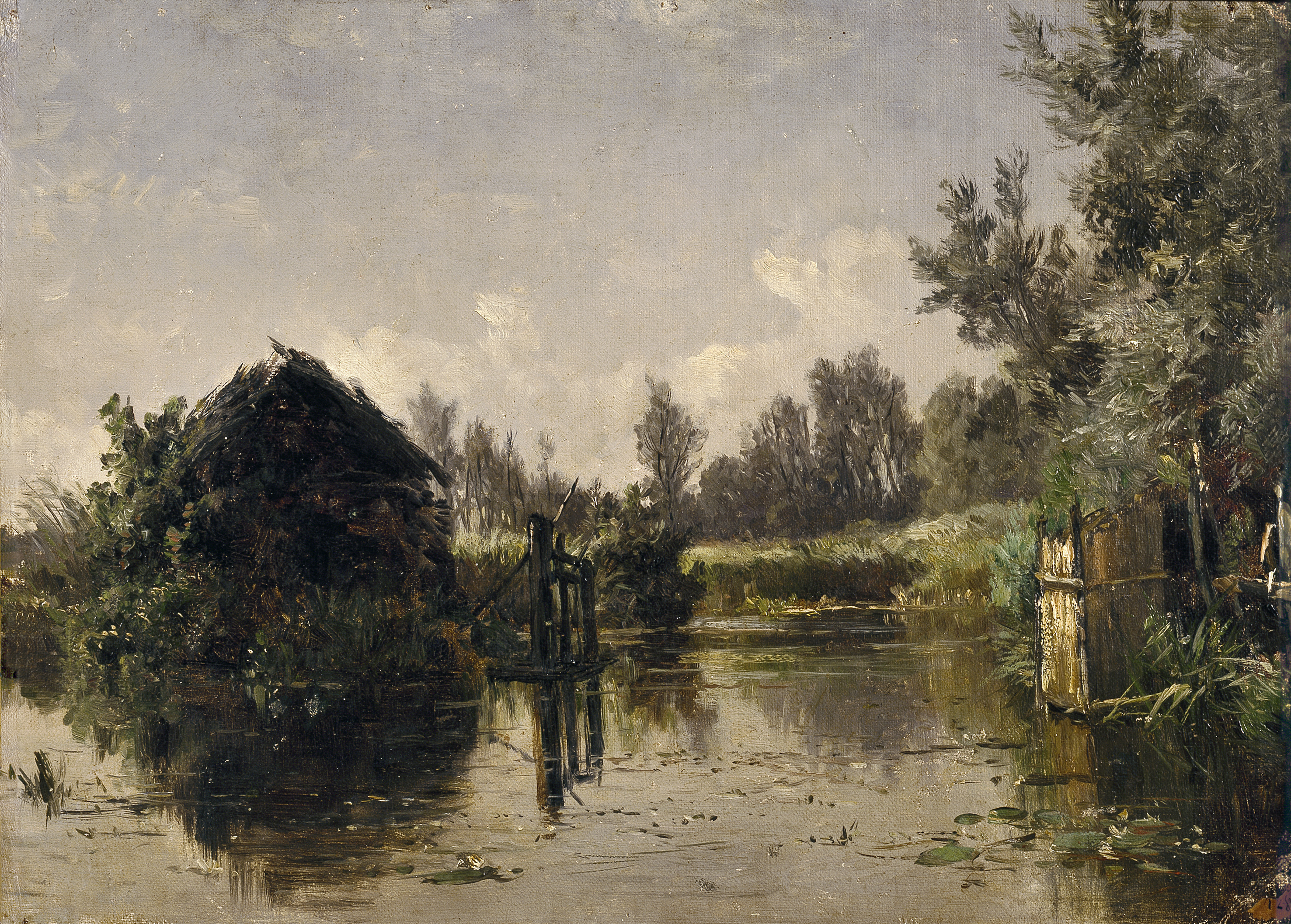 En primer término, aguas estancadas y a la izquierda, una choza que se refleja desdibujada en las aguas pantanosas de la laguna. Unas rústicas compuertas de madera abiertas canalizan el agua que se pierde en la lejanía entre los matorrales y la vegetación de ambas orillas. A la derecha, como recurso frecuentemente utilizado por Haes, un primer plano lateral cortado de un árbol y al fondo arbolado de ribera (Gutiérrez Márquez, A., Carlos de Haes en el Museo del Prado 1826-1898, Madrid, 2002).